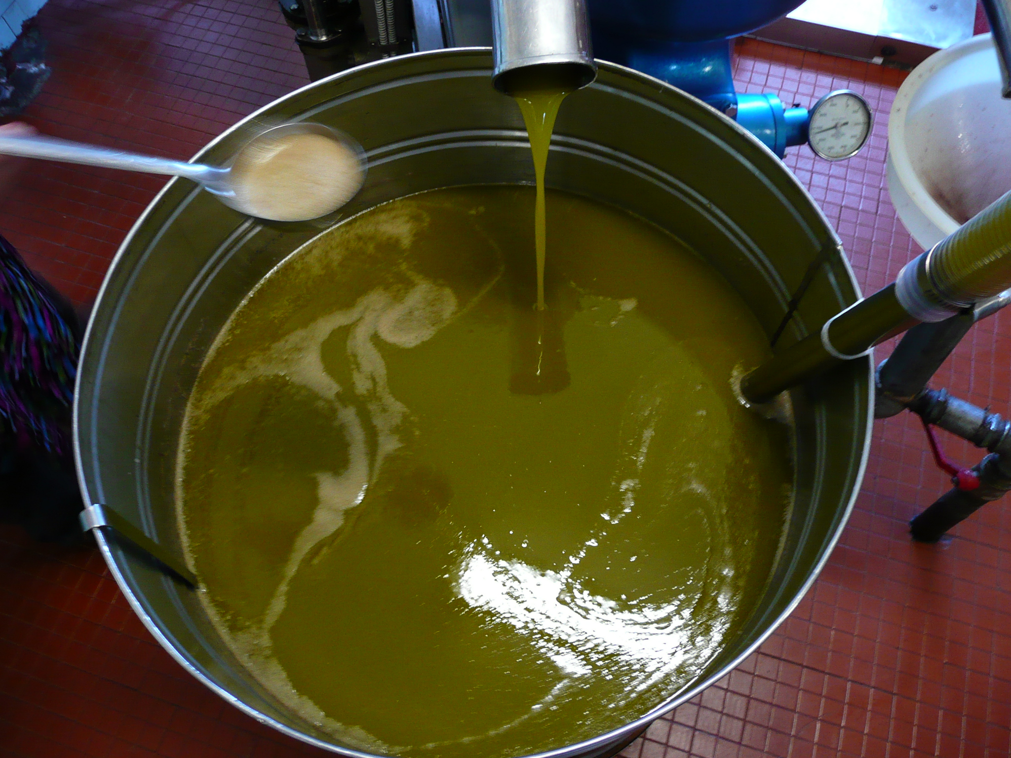 Olio Extra Vergine d'Oliva Novello 2008